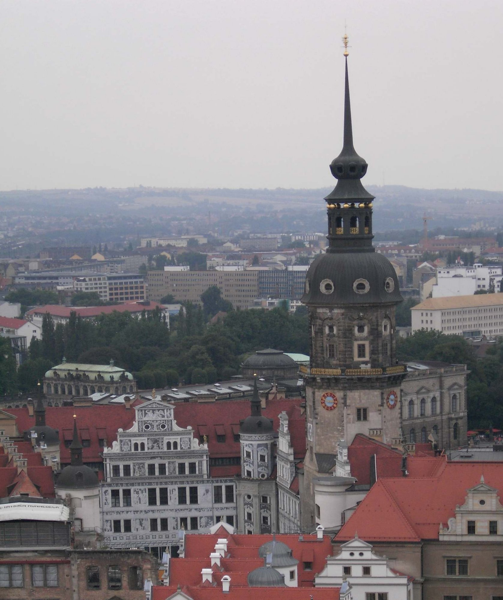 Dresden. View from the Frauenkirche to Residenzschloss.